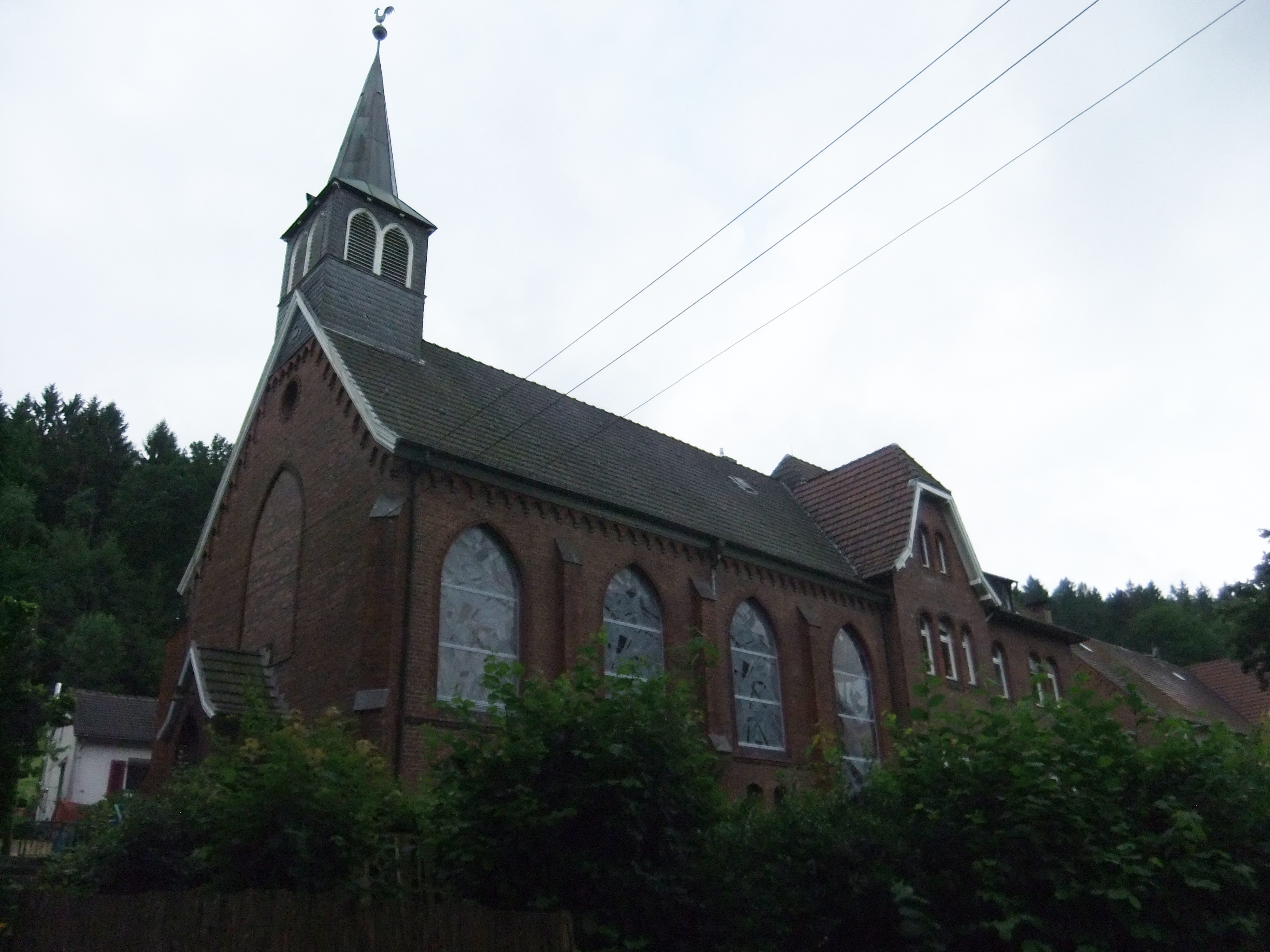 Ansichten der Evangelischen Kirche im Wuppertaler Ortsteil Laaken